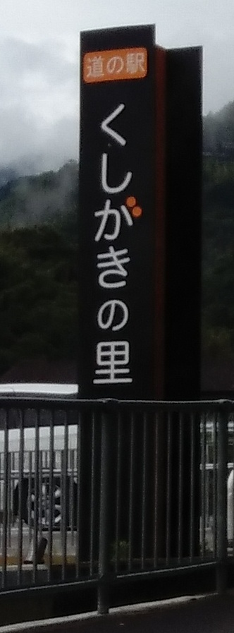 道の駅くしがきの里の入り口看板